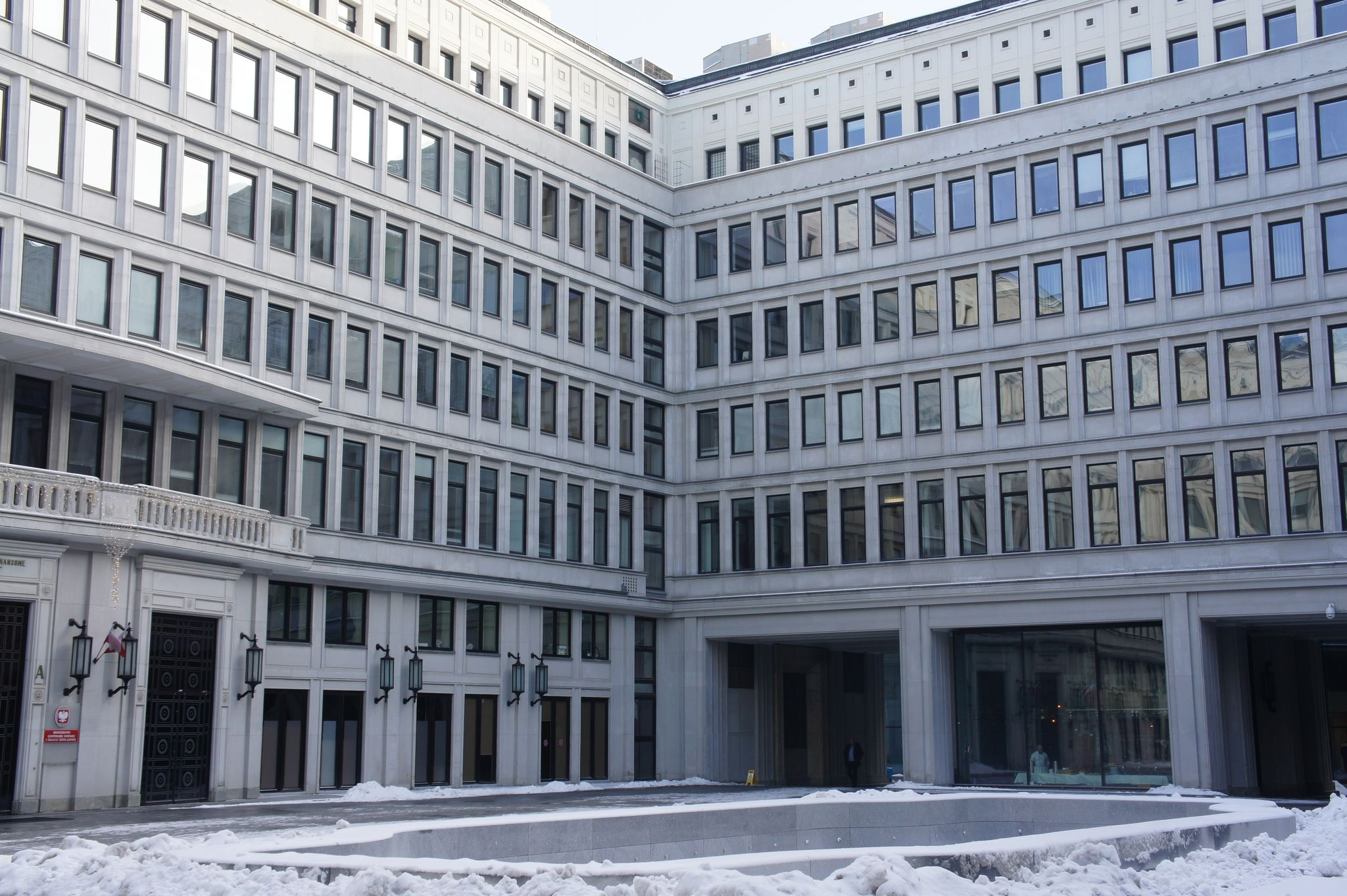 Dziedziniec Centrum Bankowo-Finansowego (dawnej siedziby KC PZPR) w Warszawie.